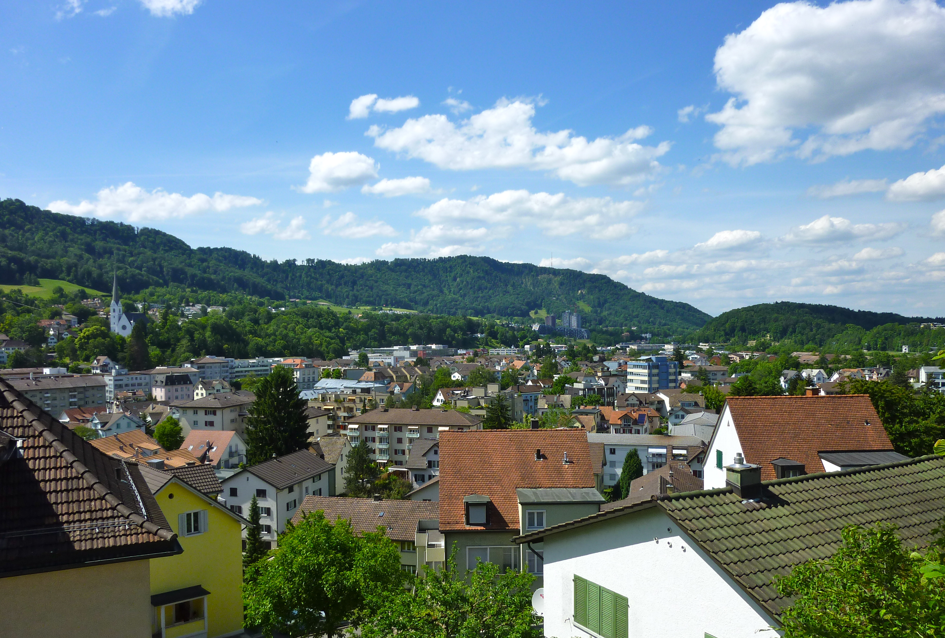 Adliswil